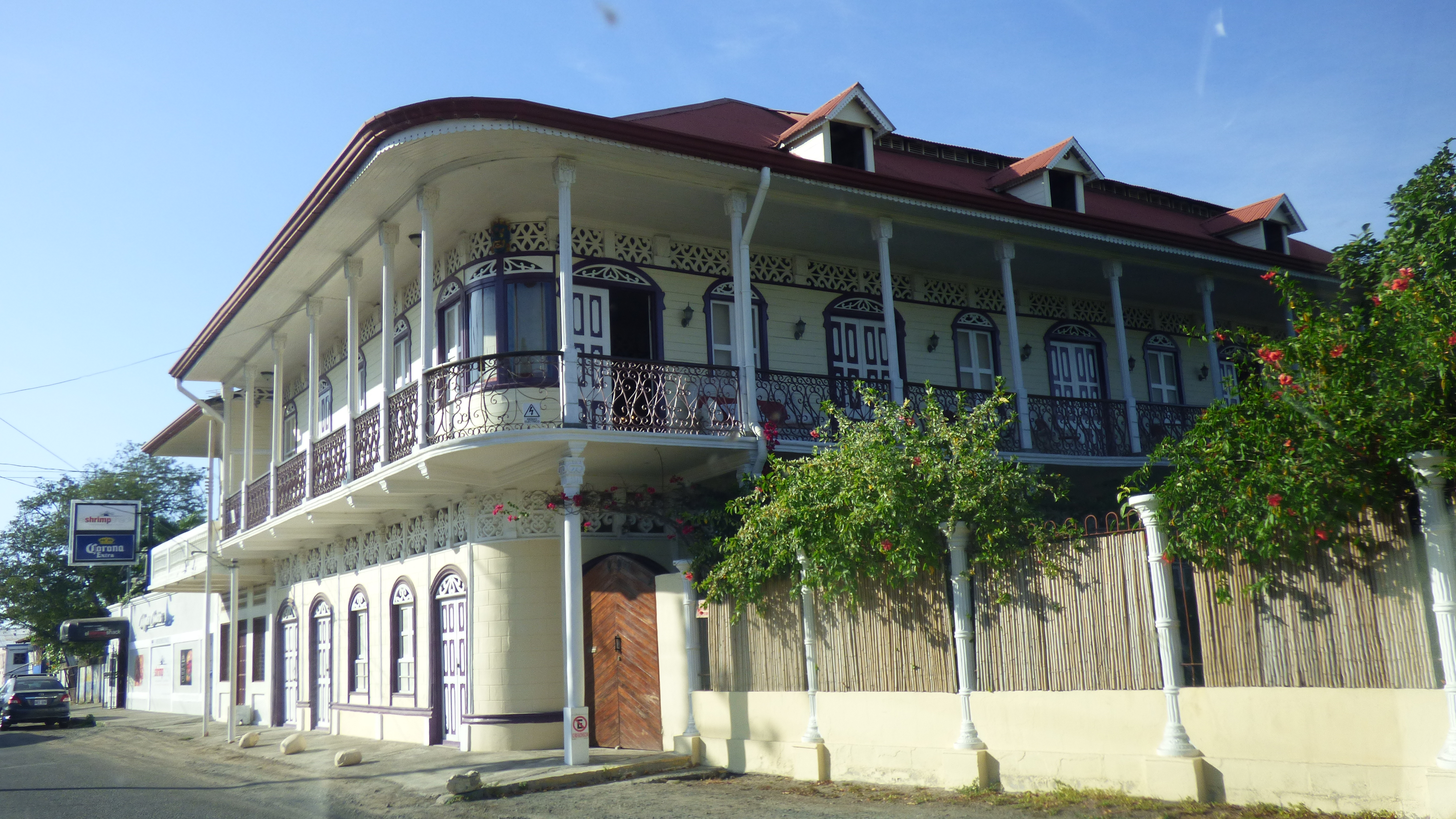 La Casa Fait, edificio patrimonial en la ciudad de Puntarenas, Costa Rica. Data de 1925, con arquitectura victoriana y costera.